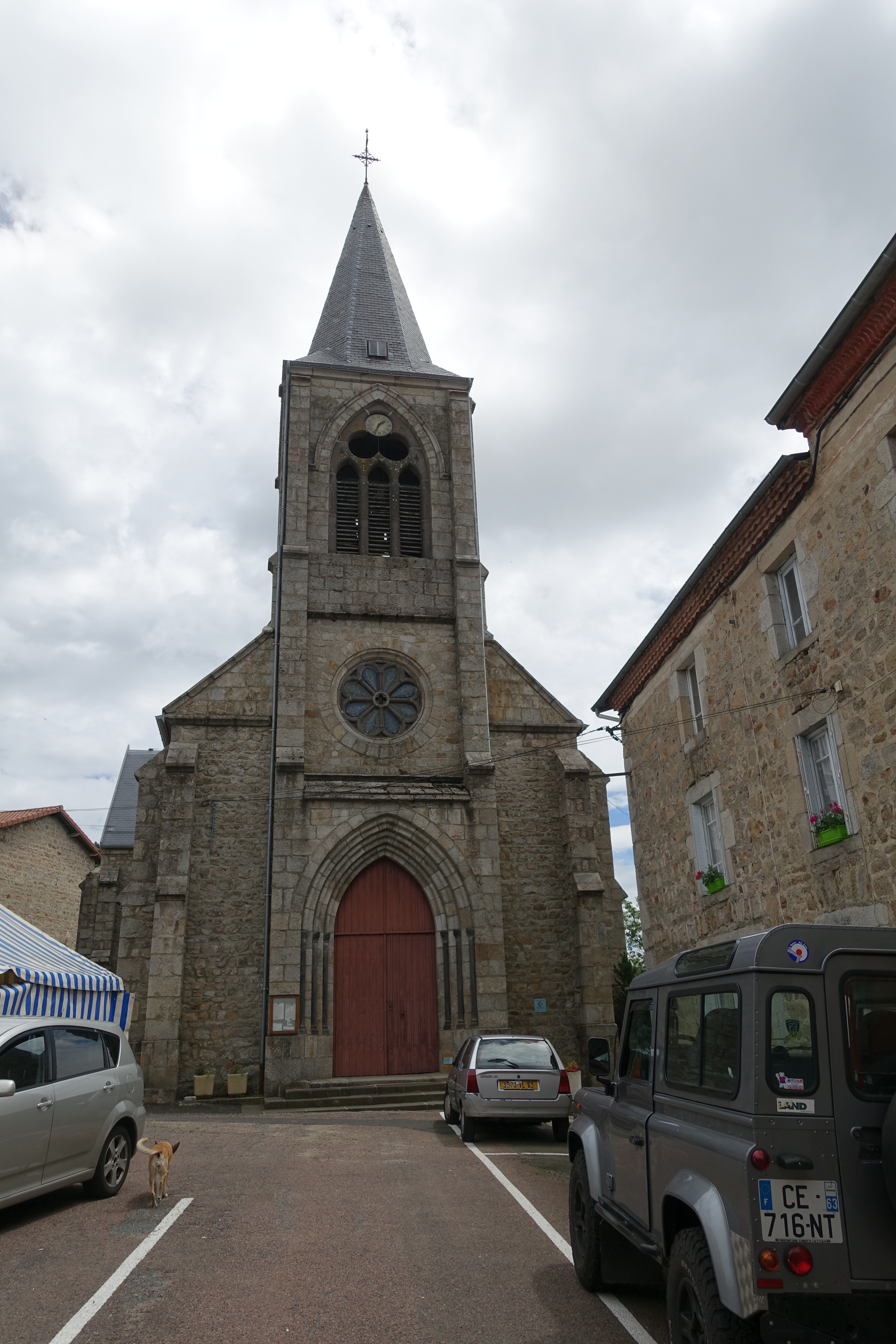 Eglise saint-blaise d'arconsat